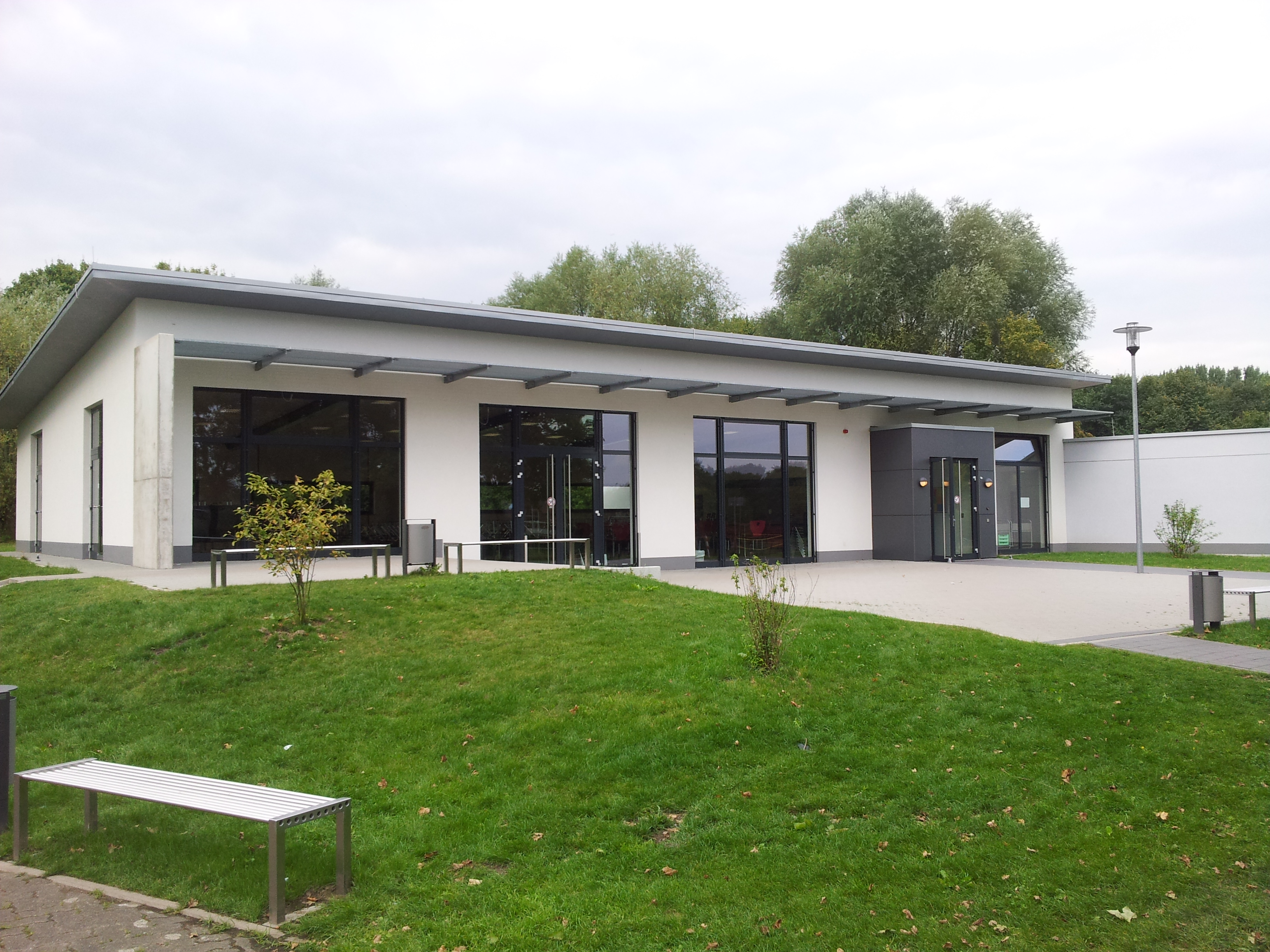 Die neugebaute Mensa des Anne-Frank-Gymnasiums Werne